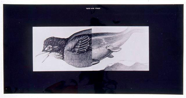 Painting